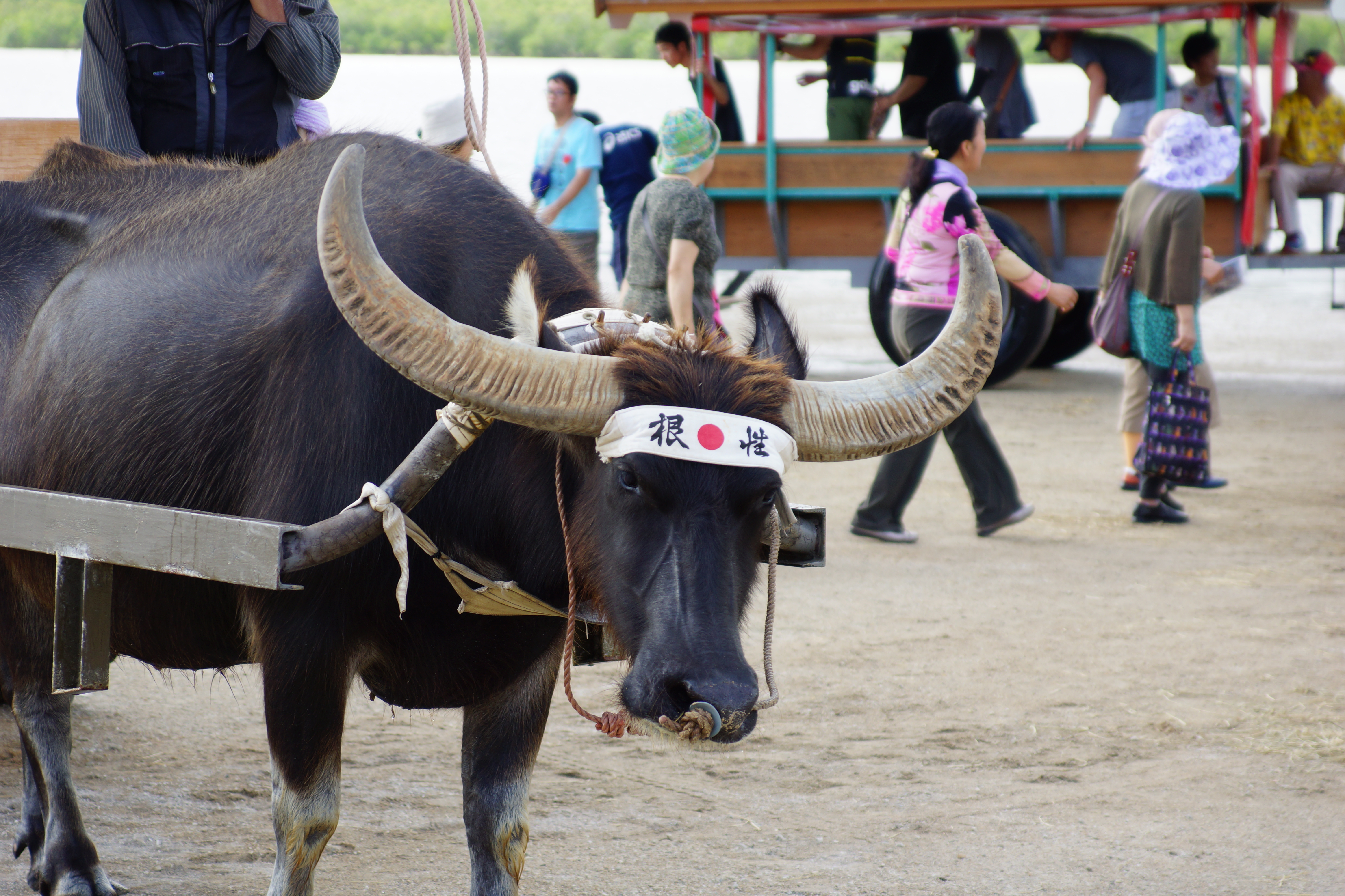 根性